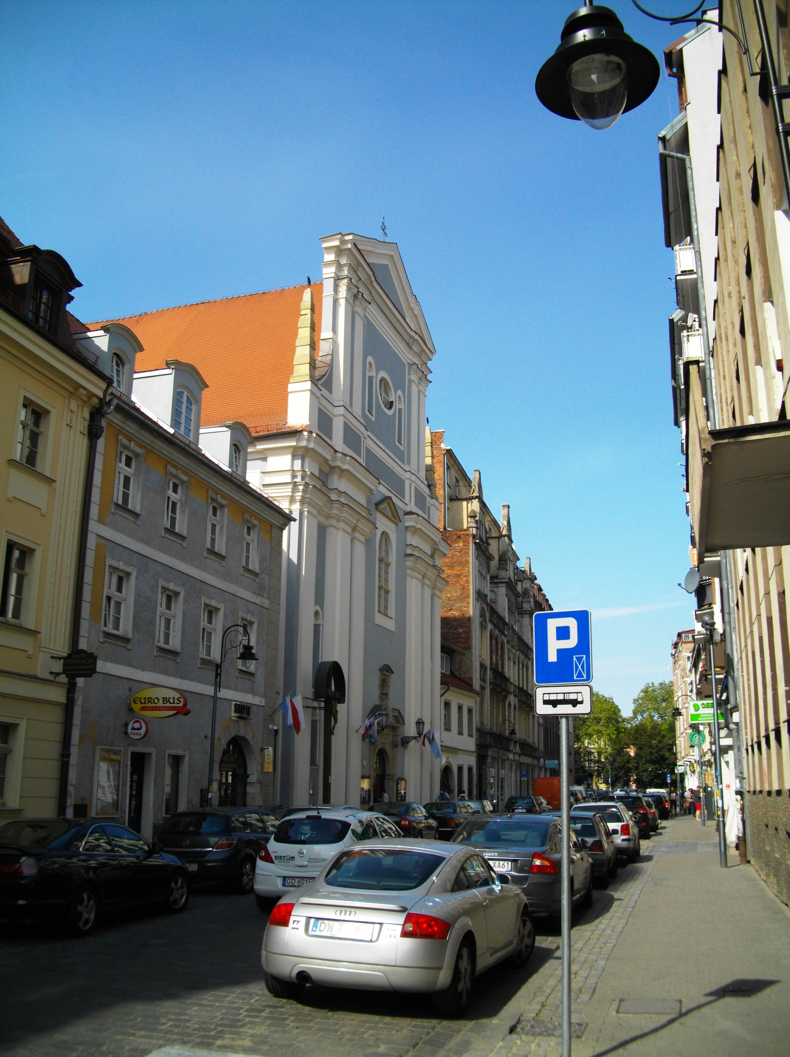 Wrocław, kościół, ob. par. p.w. św. Antoniego, 1680-1692